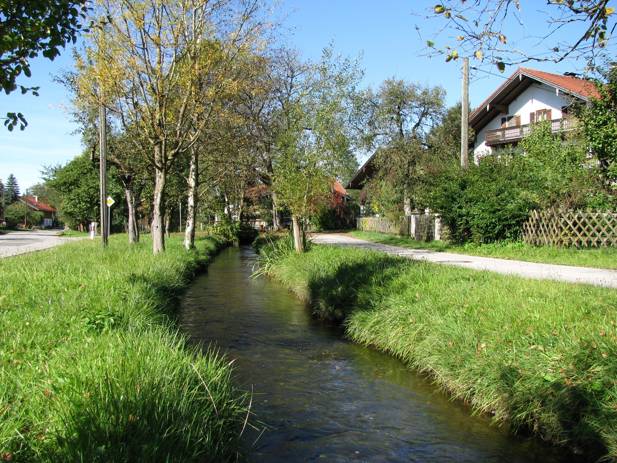 Dorfbach in Ascholding (Mooshamerweiherbach)